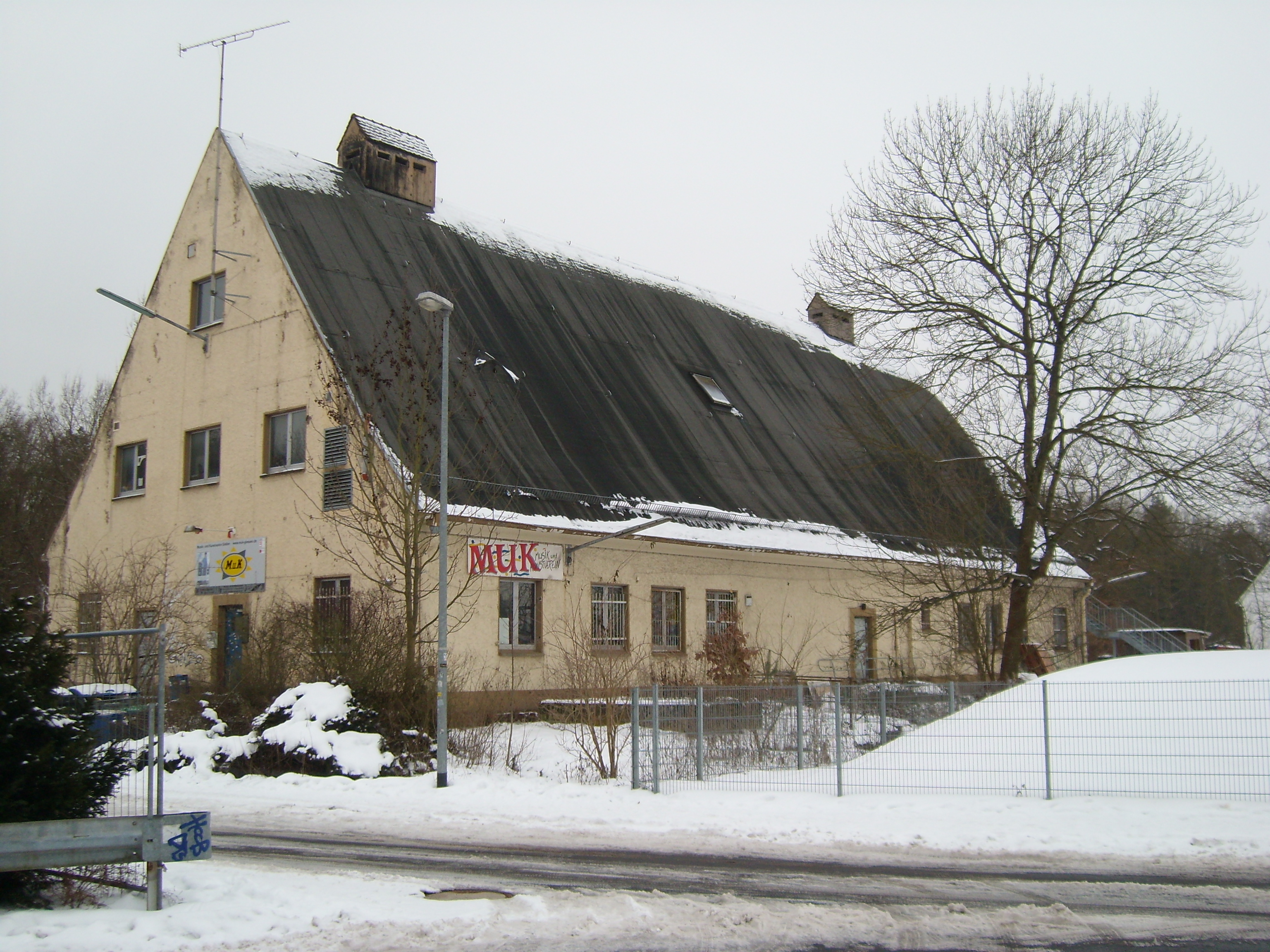 Bild des Ehemaligen Kommandobunkers V19 in Gießen